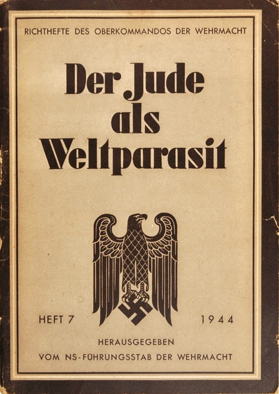 Titelblatt einer antisemitischen Schrift der Wehrmacht